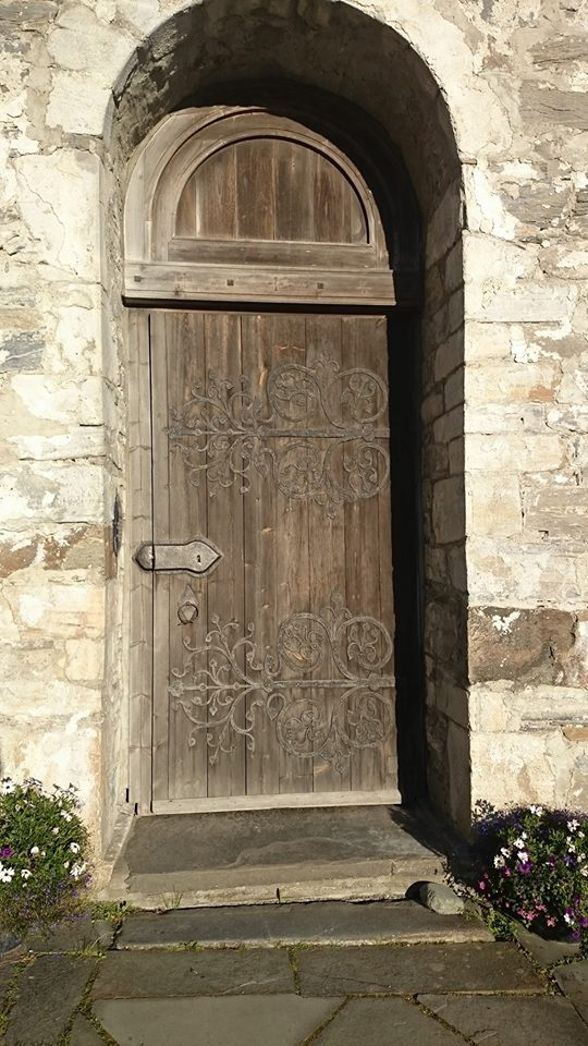 Vestportalen på Sakshaug gamle kirke, Inderøy, Norge